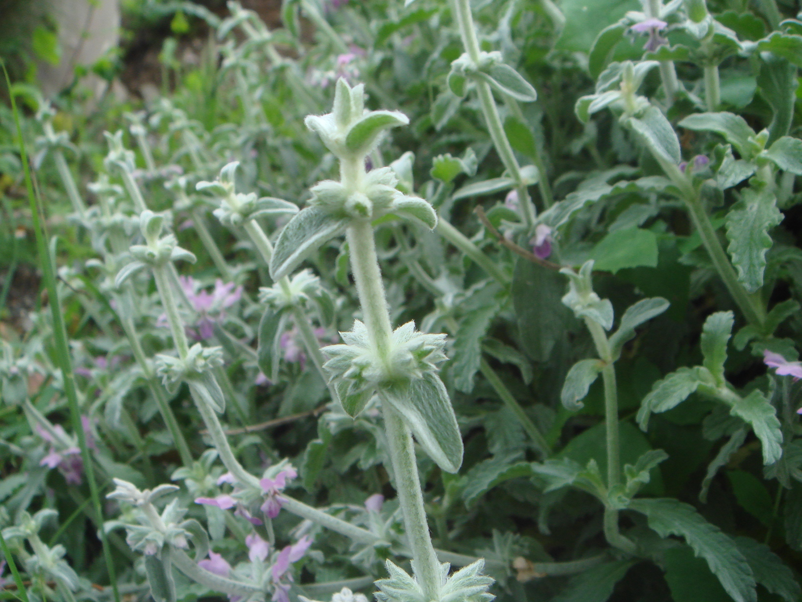 (Stachys fontqueri), Ceuta, España.